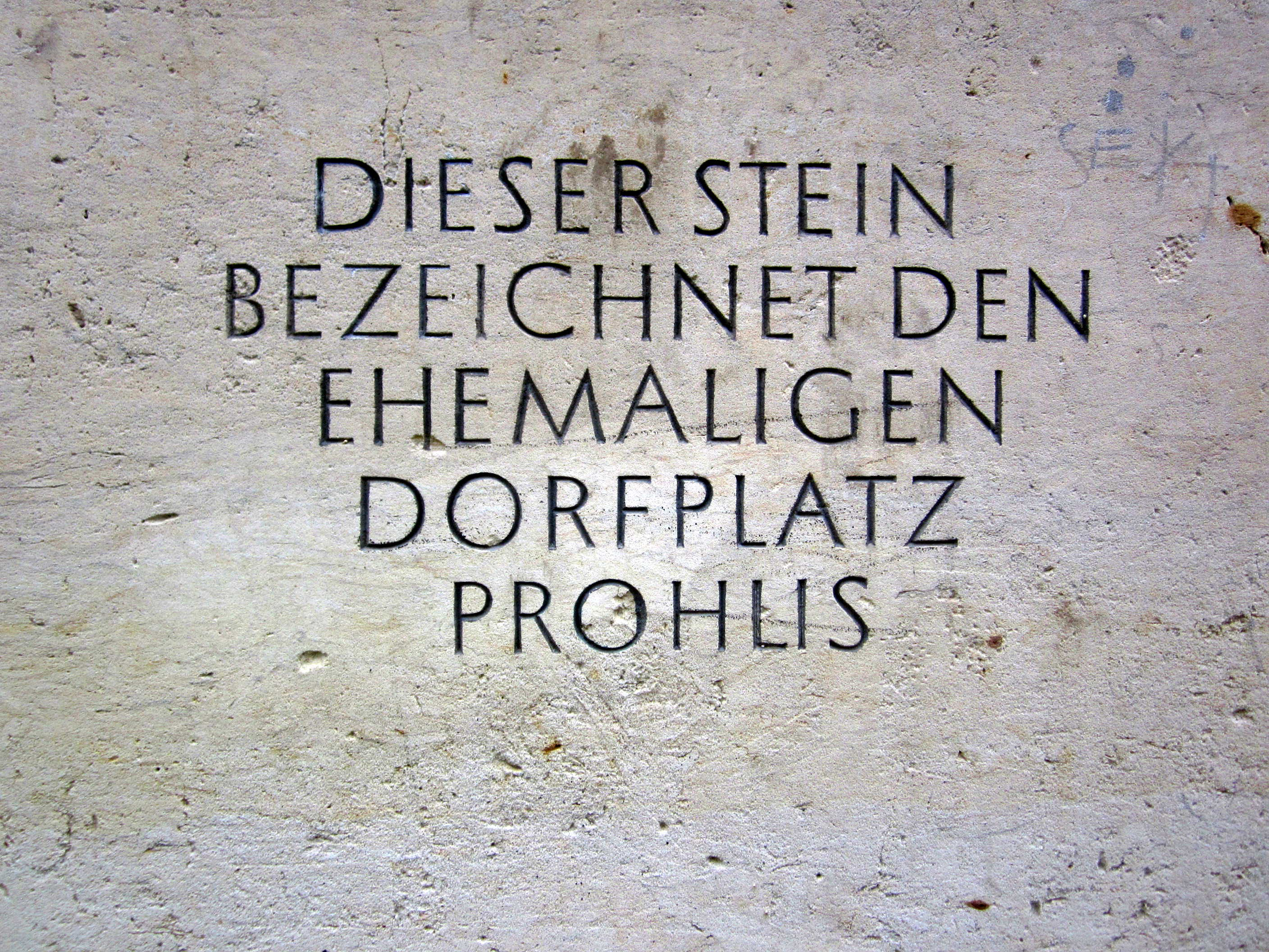 Dresden Prohlis Palitzschdenkmal 1988 Rückseite Inschrift "Dieser Stein bezeichnet den ehemaligen Dorfplatz Prohlis"